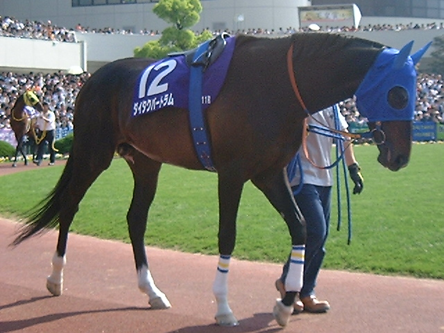 ダイタクバートラム 2003年5月4日 京都競馬場